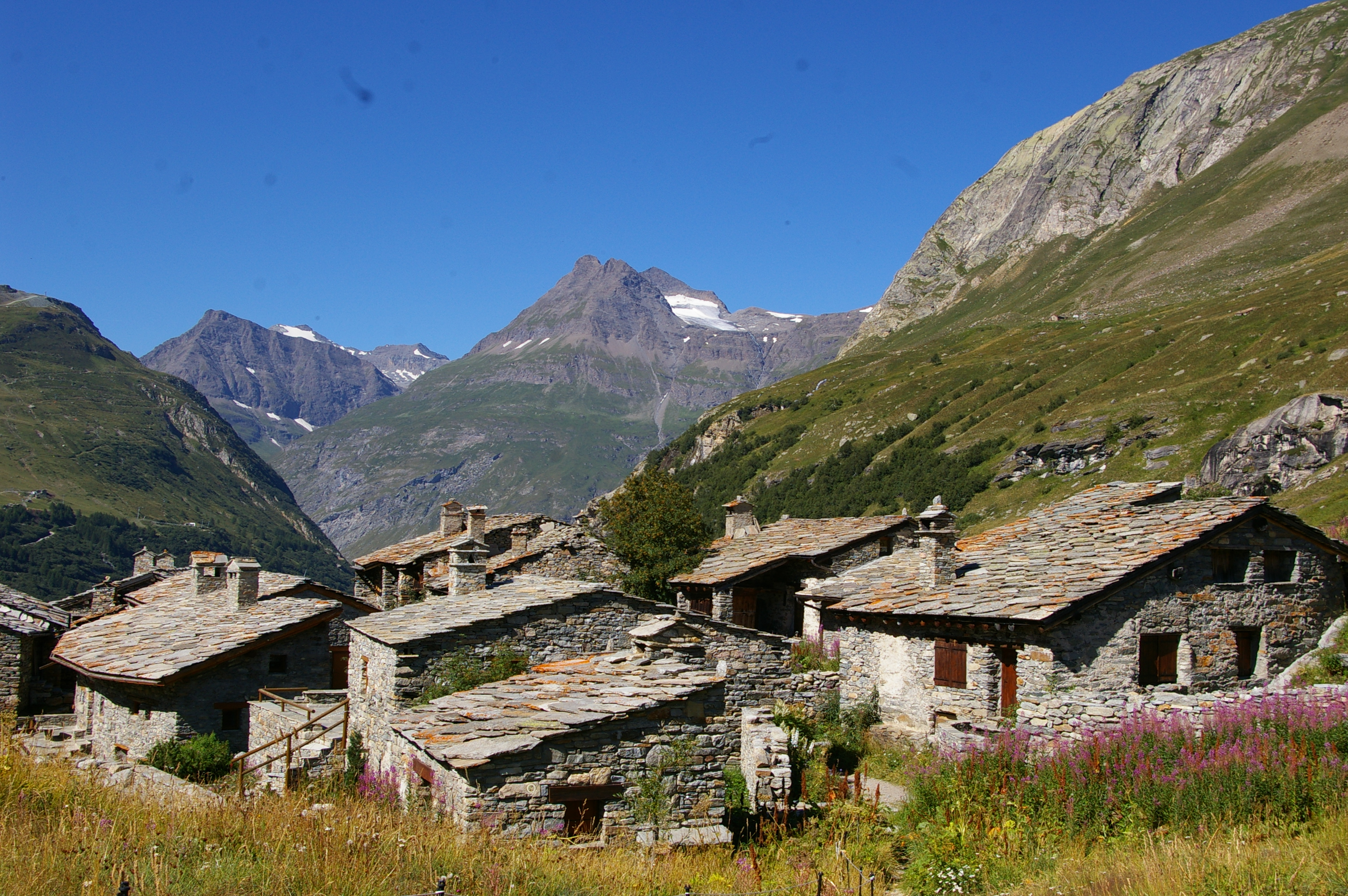 Hameau de l'Ecot situé à 4 km du village, perché à 2000 m d'altitude . Il fait l'objet d’une très jolie balade. Ses maisons de pierre et de lauze surplombent le bas de la vallée